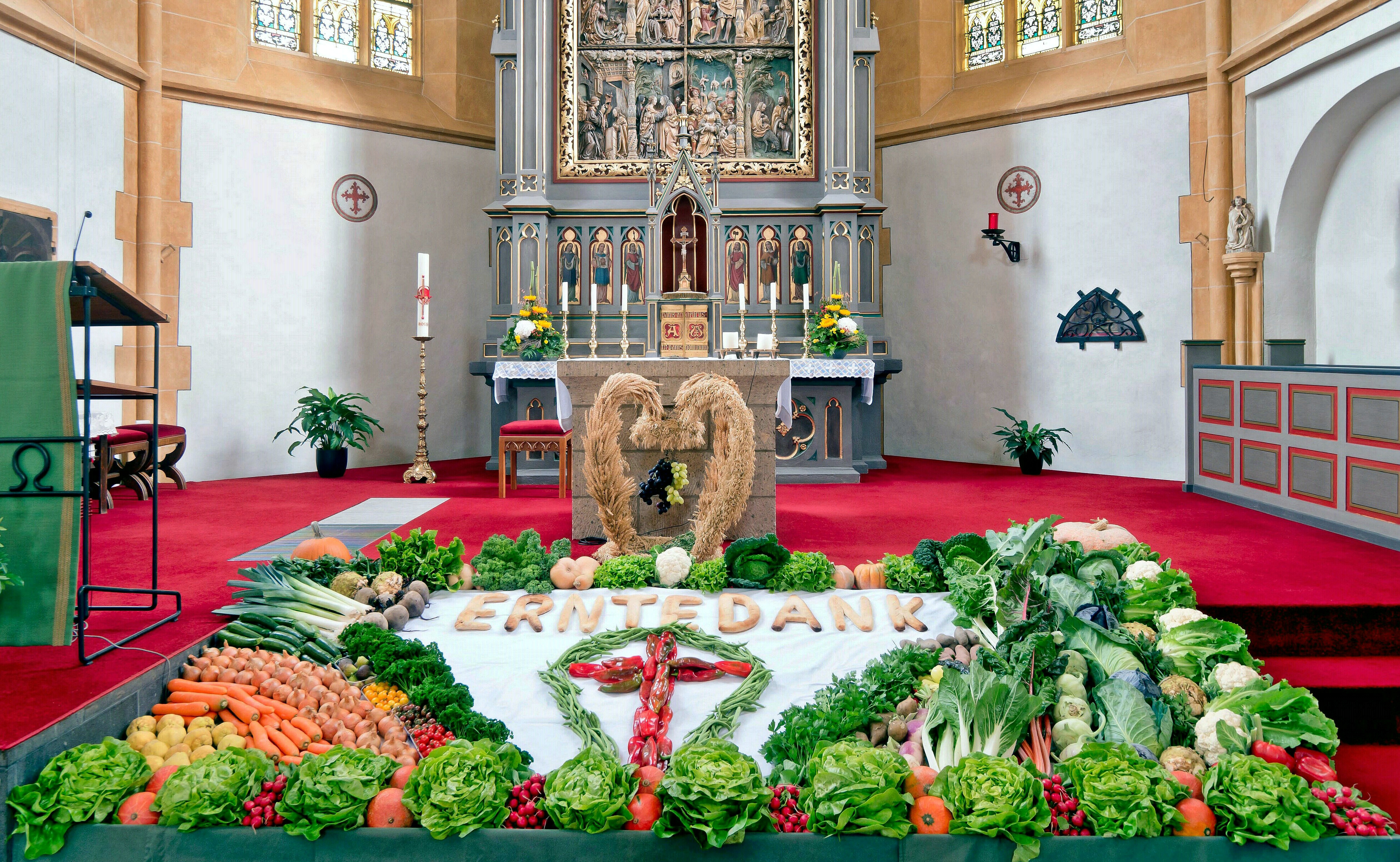 In der durch intensiven Gemüse- und Obstanbau geprägten Gemeinde Niederwerth auf der gleichnamigen Rheininsel hat das Erntedankfest einen hohen Stellenwert. Der Altar der Pfarrkirche St. Georg wird dann mit der ganzen Vielfalt der örtlichen Erzeugnisse geschmückt.